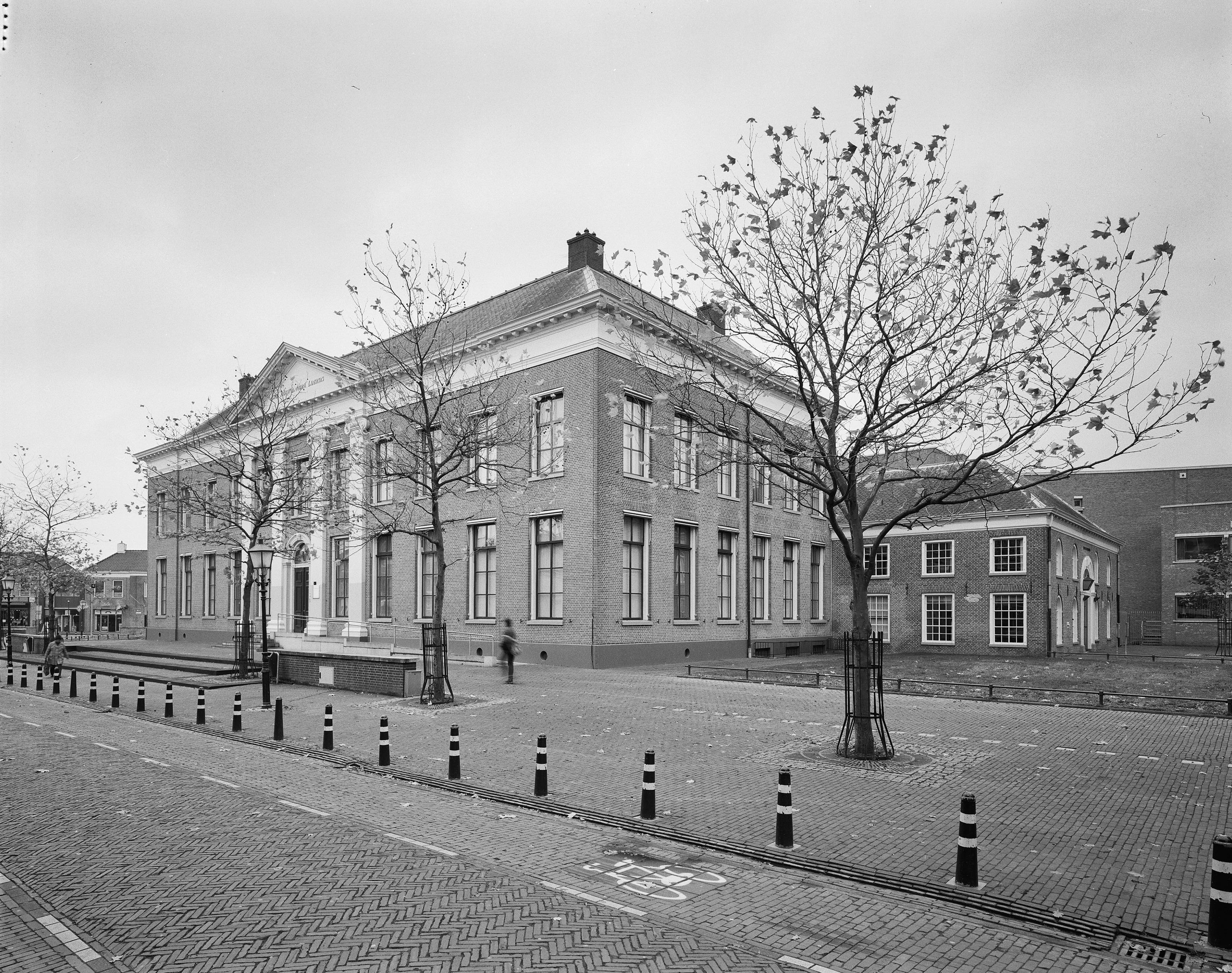 Paleis van Justitie: Exterieur overzicht voorgevel, rechter zijgevel (opmerking: Monumenten In Nederland Drenthe, bladzijde 71)